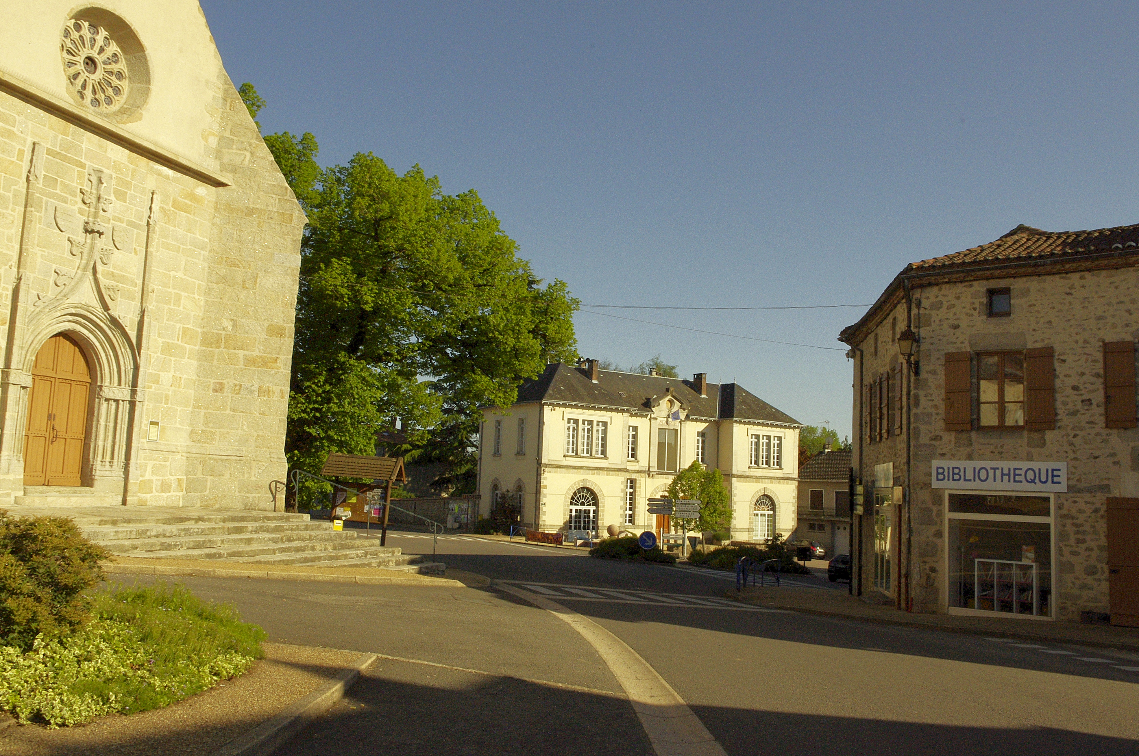 Saint Mathieu (Haute-Vienne, France) - le centre du bourg avec l'église, la mairie et la bibliothèque.